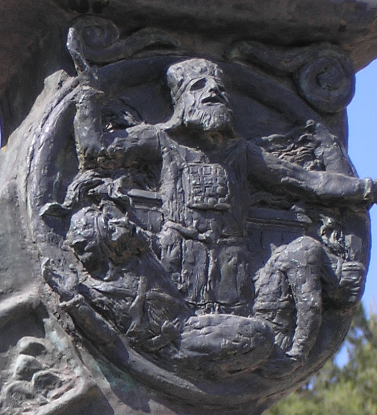 The Knesset Menorah, Jerusalem (detail)